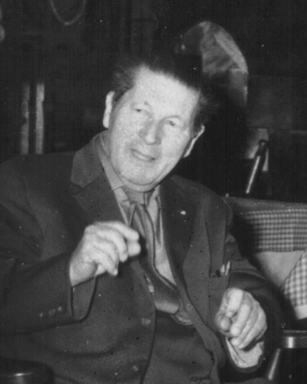 prive-foto, genomen op 27 december 1962 in de Raadskelder te 's-Hertogenbosch